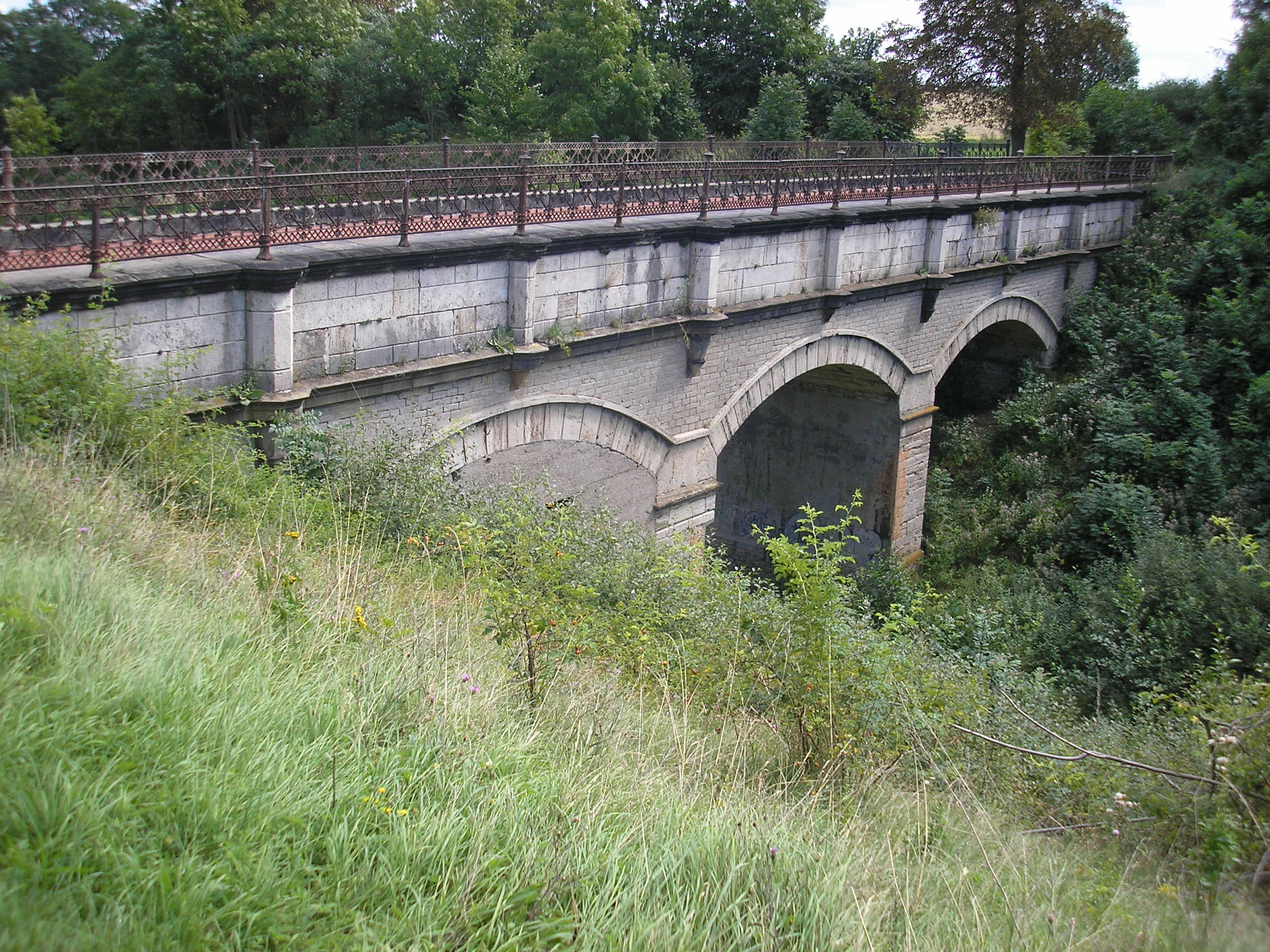 Das Aquädukt des Leinakanals über die ehemalige Trasse der Thüringer Bahn bei Gotha.